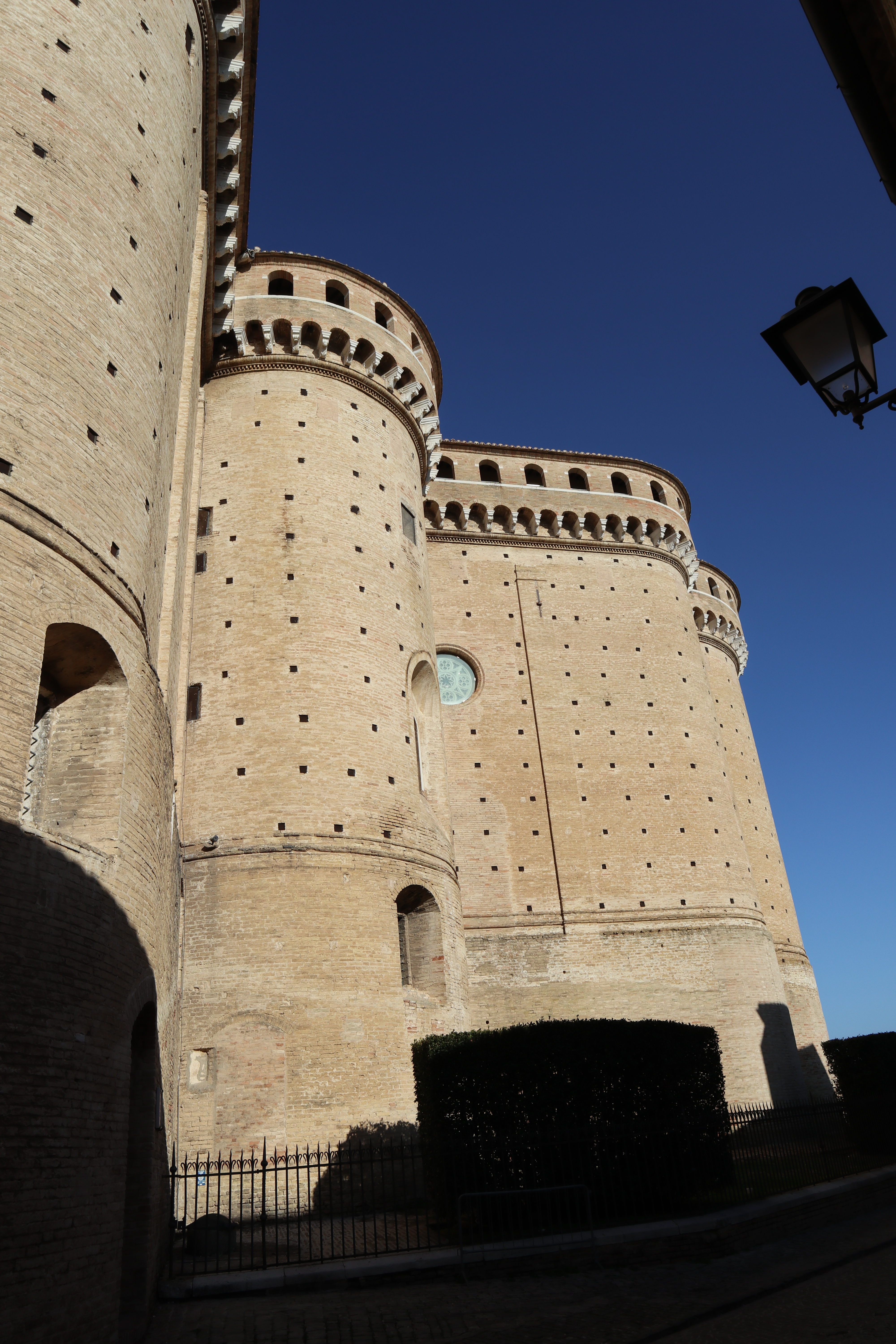 Absidi esterne di Baccio Pontelli.